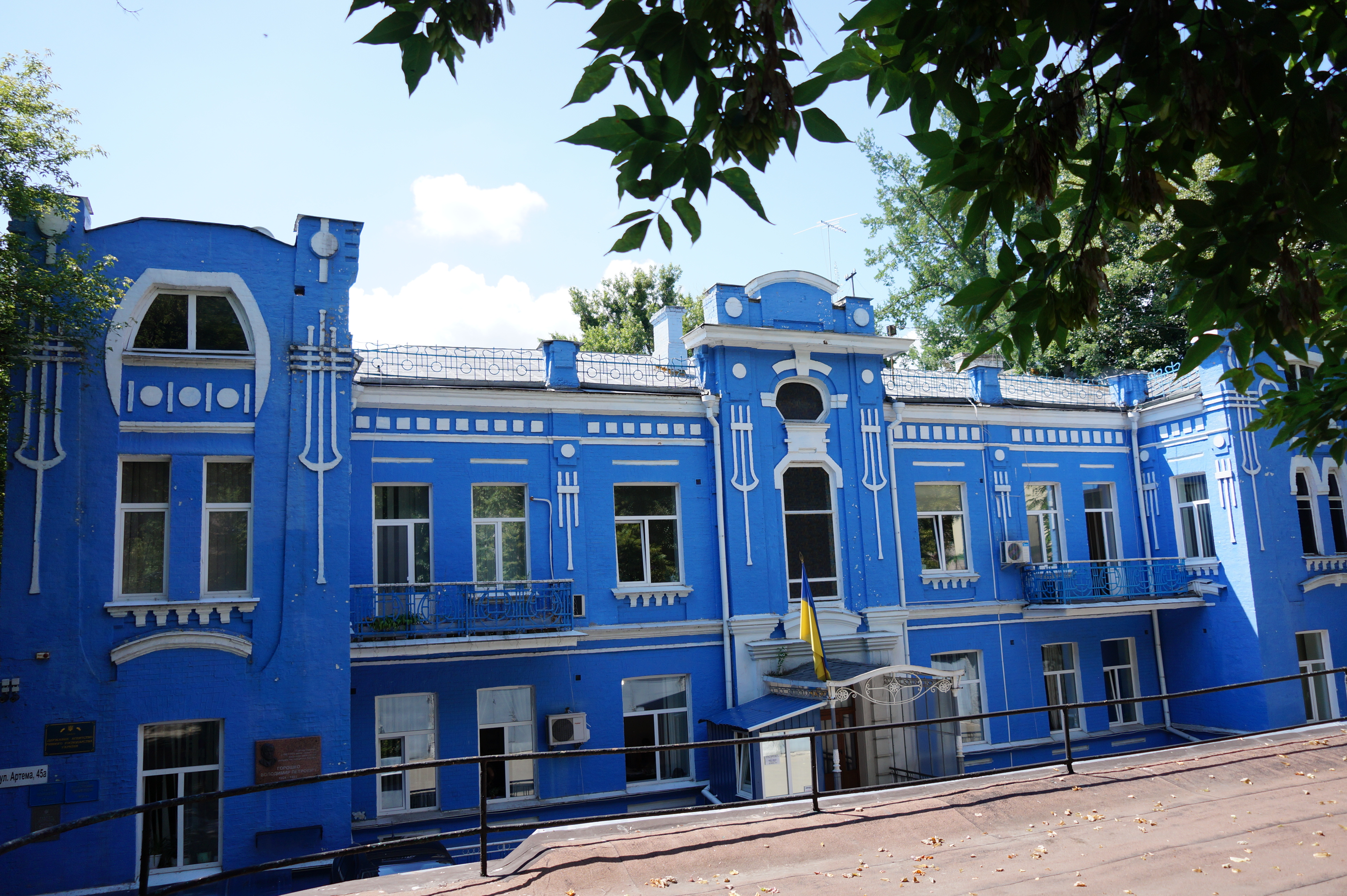 Флігель житловий з риборозплідником, Київ, Артема вул., 45-д